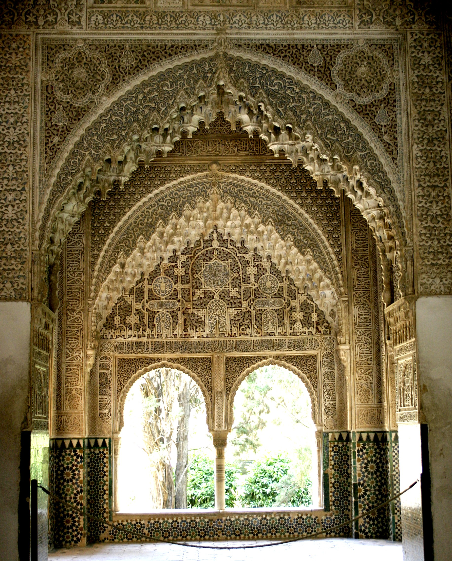 Granada, Alhambra: belső tér